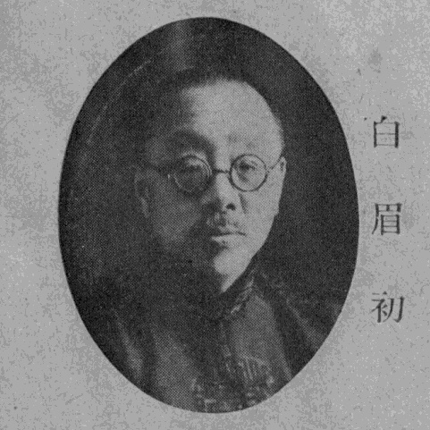 中文（台灣）: 《民國名人圖鑑》肖像